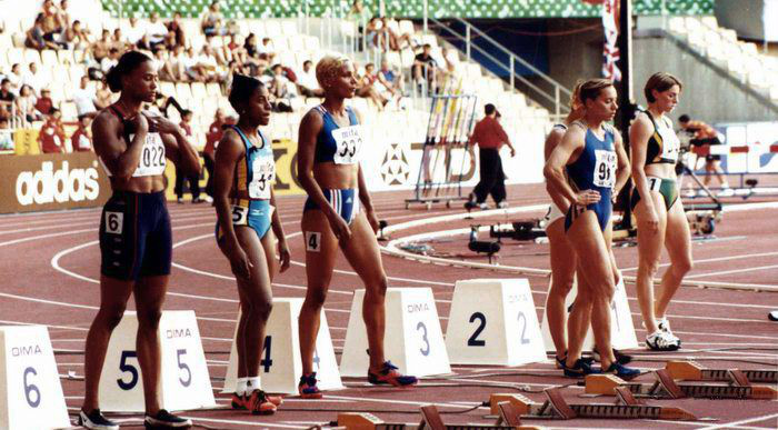 Semifinal de 100 m en el Campeonato del Mundo de Sevilla 99, con Marion Jones, Debbie Ferguson, Christine Arron, Zhanna Tarnopolskaya-Pintusevich, Andrea Philipp y Lauren Hewitt.